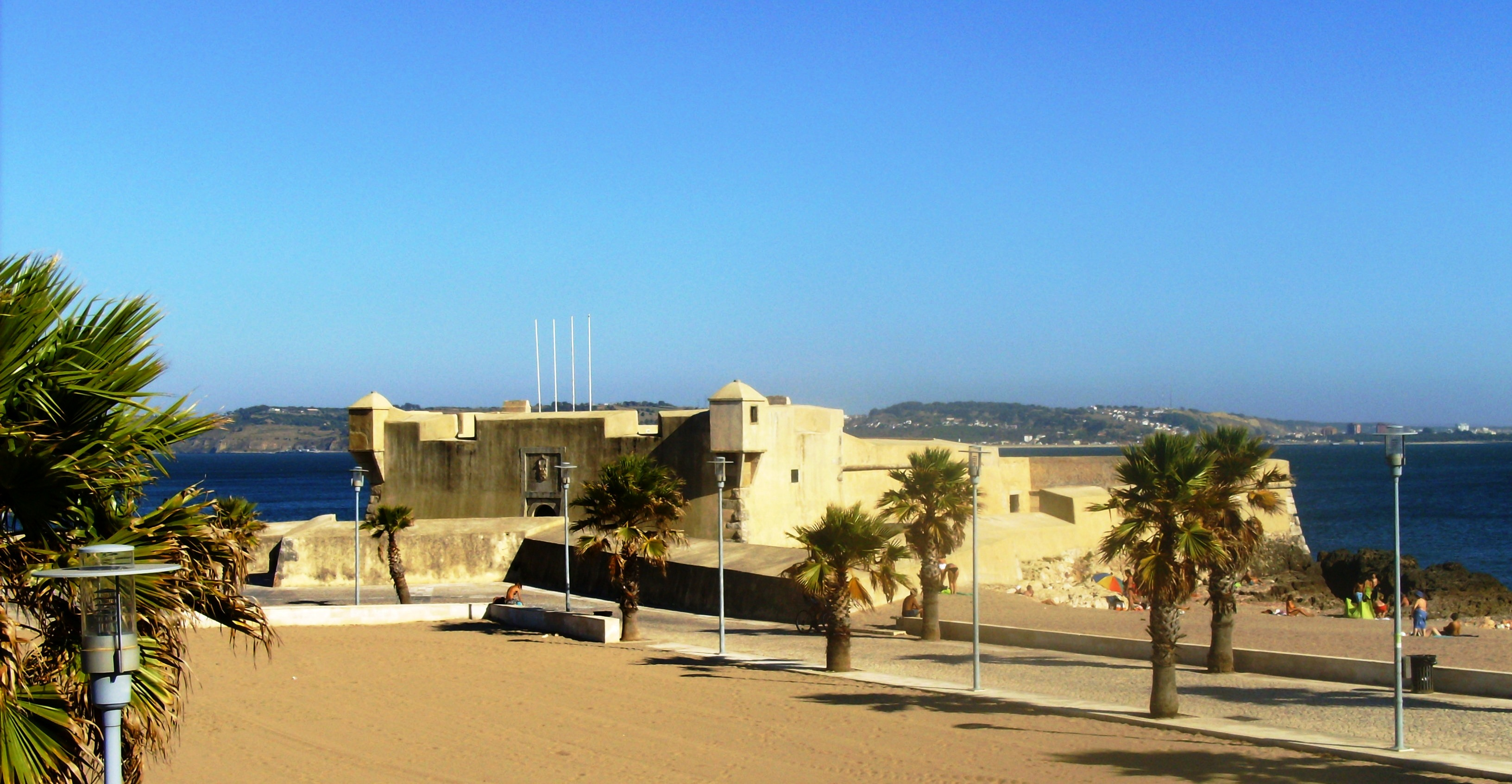 Forte de São Bruno de Caxias, Oeiras, distrito de Lisboa, Portugal.